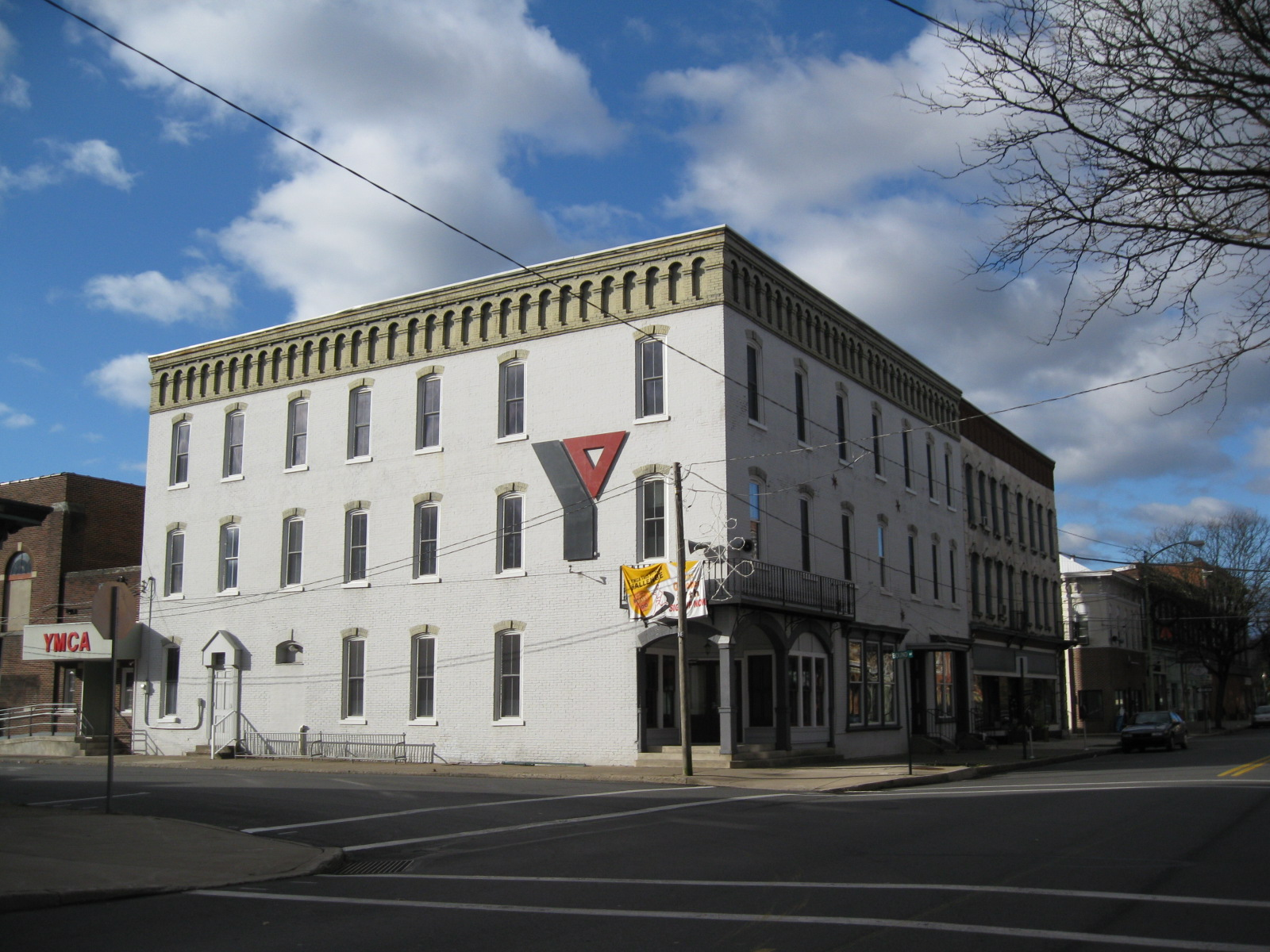 Milton, Pennsylvania